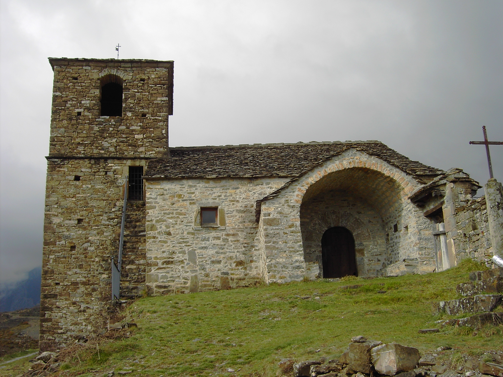 La iglesia de Vió, en el municipio sobrarbés de Fanlo